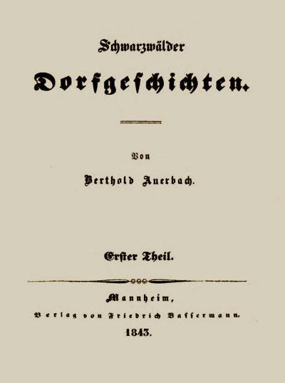 Berthold Auerbach, Schwarzwälder Dorfgeschichten, Band 1, 1843, Titelblatt.